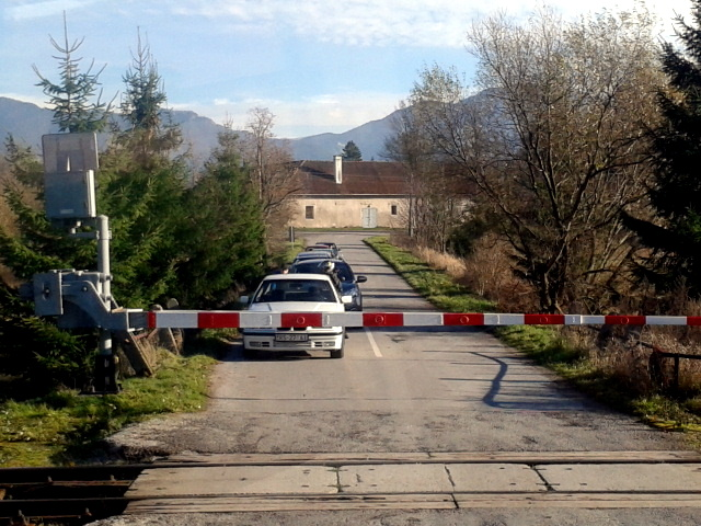 železničné priecestie